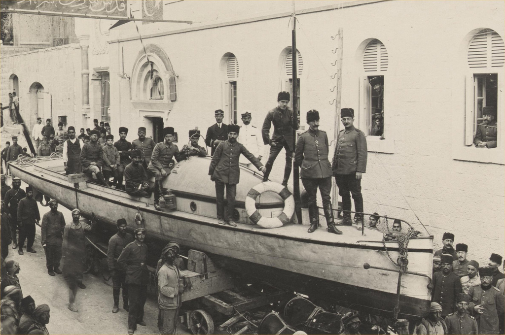 סירת מנוע ומפרש תורכית מועברת ברחובות יפו בדרכה לים המלח 1917